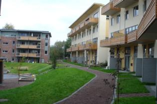 Baglerbyen i bydel gamle Oslo